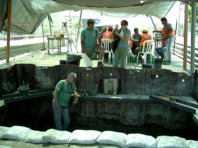 Tell Abu Hawam Excavation 2001 by Haifa University Israel. The head of the expedition was Professor Michal Artzy. משלחת חפירות ארכאולוגיות בתל אבו הואם שהתקיימה בשנת 2001 ע"י אוניברסיטת חיפה , החוג לציוויליזציות ימיות בראשות פרופ' מיכל ארצי. התל נמצא במפרץ חיפה והיה עיר נמל עתיקה באזור המפרץ מתקופת הברונזה המאוחרת ועד התקופה ההליניסטית This work is free and may be used by anyone for any purpose. If you wish to use this content, you do not need to request permission as long as you follow any licensing requirements mentioned on this page.